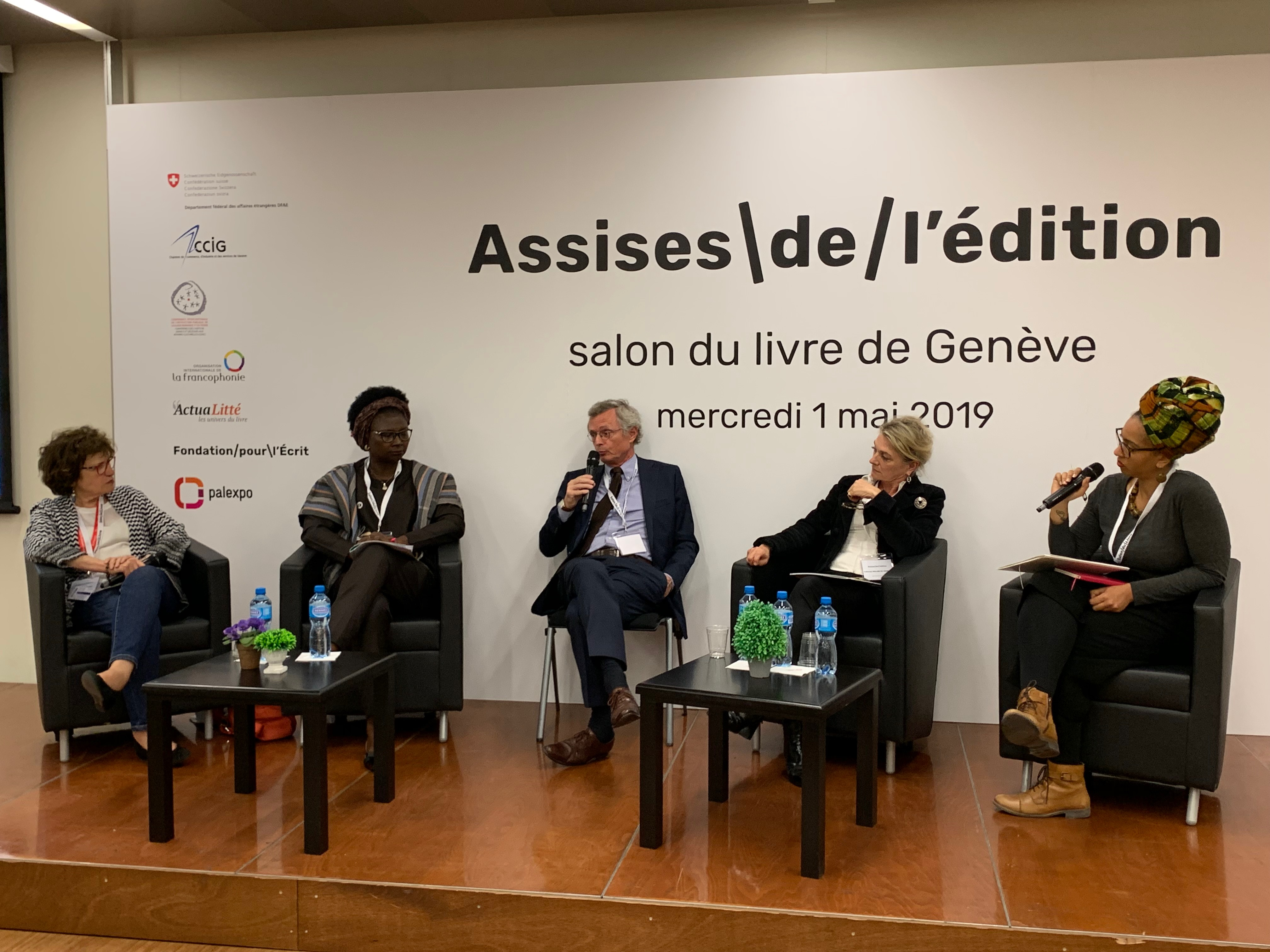 Francine Bouchet, Joie de lire - Catherine Hellier du Verneuil, Quatre fleuves - Béatrice Lalinon Gbado, Ruisseaux d’Afrique Simon Casterman - ADEB